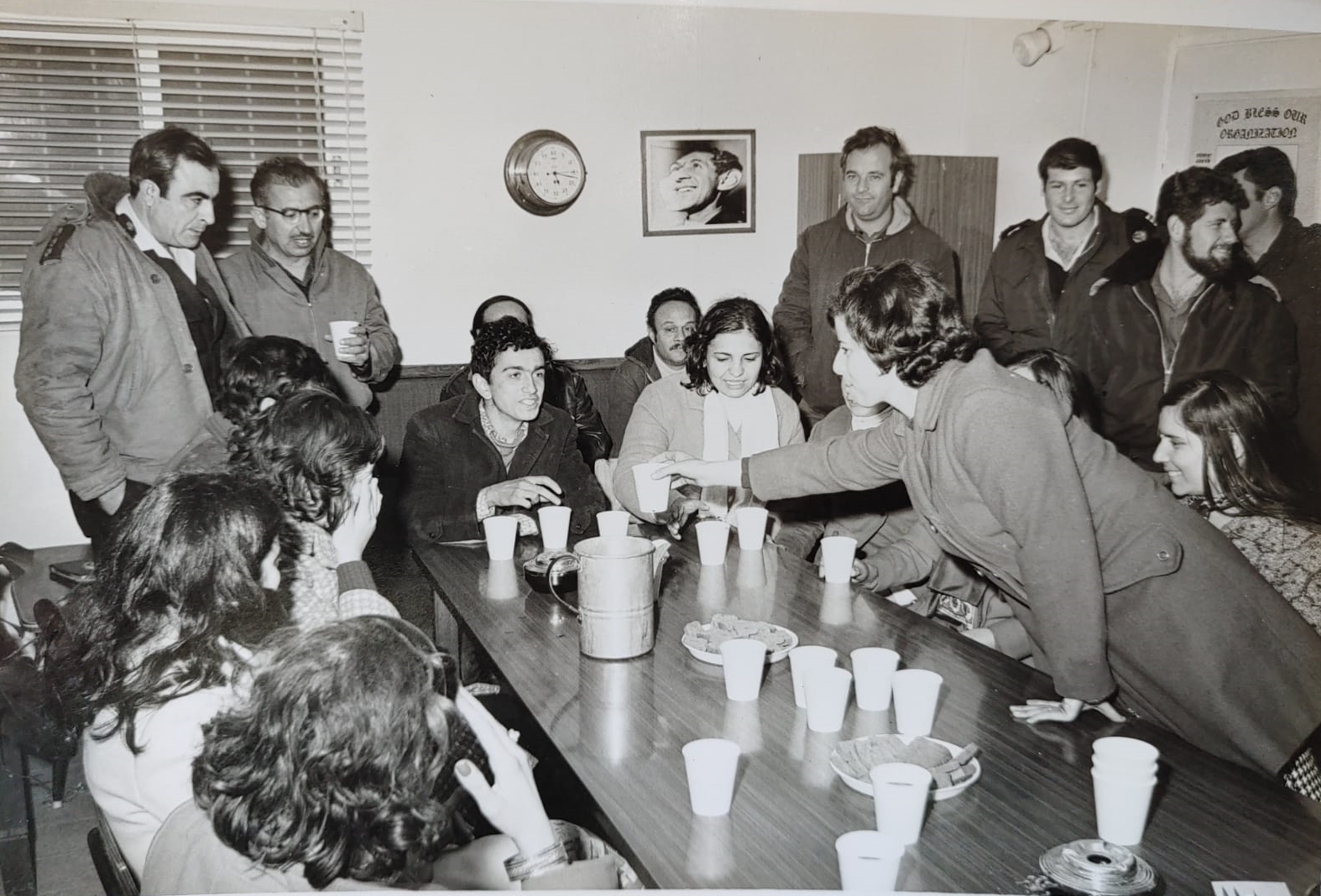 שבתאי לוי חוגג את החופש עם עולים שהוברחו מסוריה בדרך הים 1973